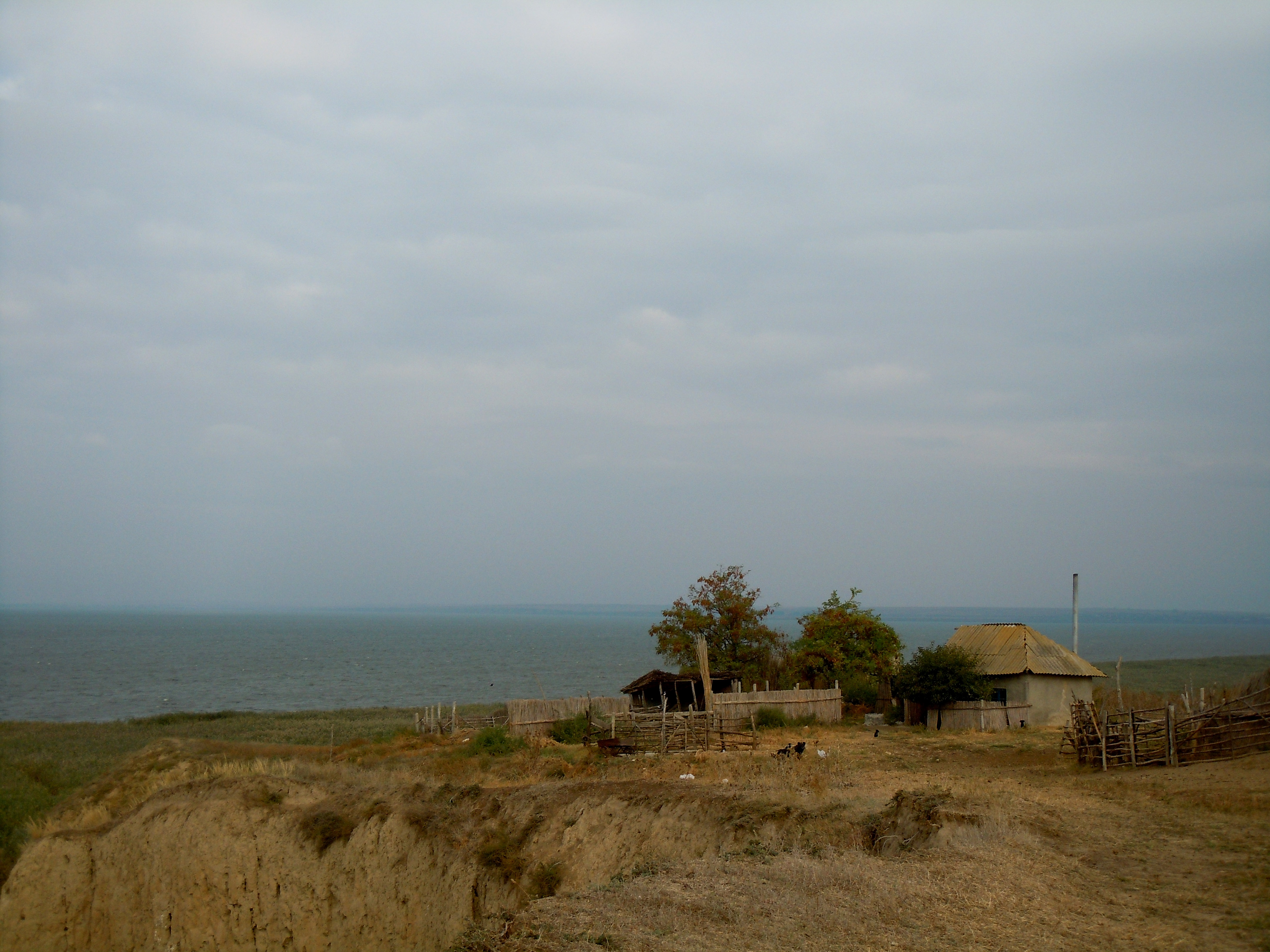 Озеро Кагул, Ізмаїльський район, Одеська область